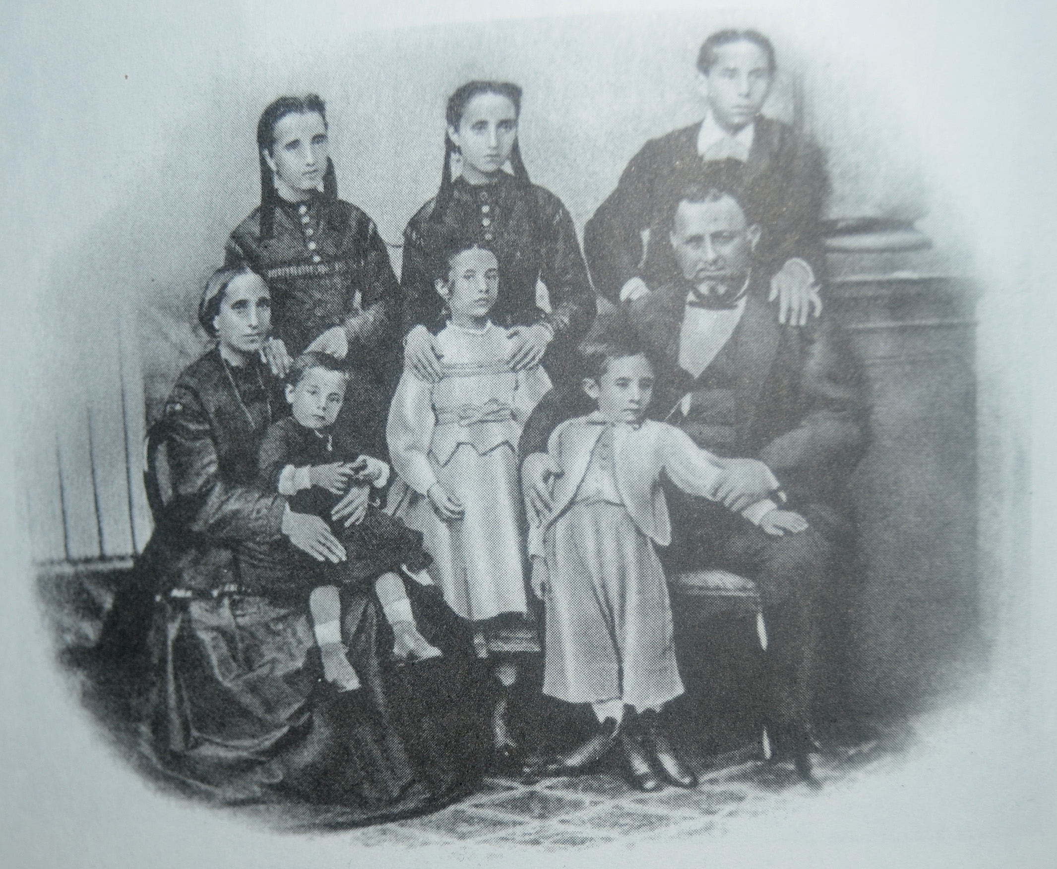 Arana-Goiri familia. Sabin Arana amaren magalean dago. - Arana-Goiri family.